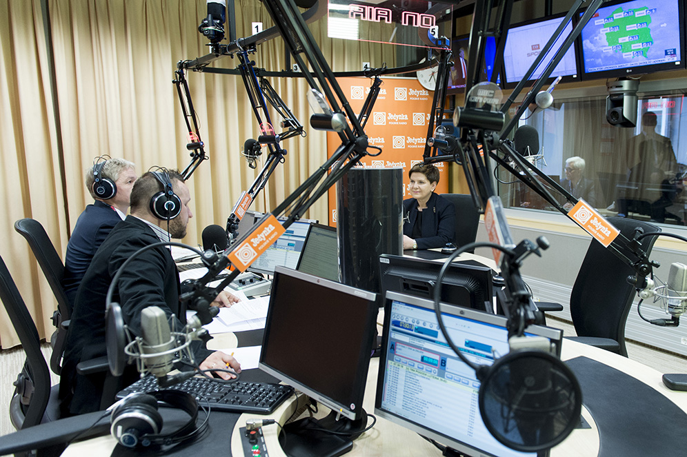 Wywiad z Beatą Szydło w "Sygnałach Dnia" w radiowej Jedynce (Polskie Radio Program I).